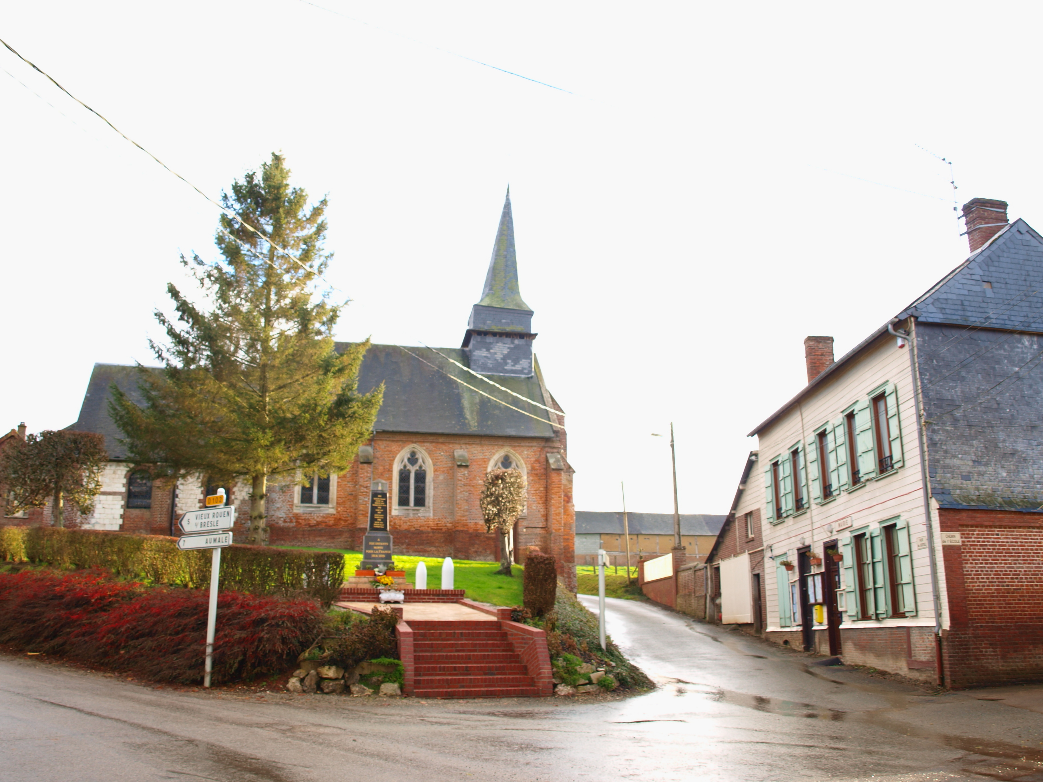 Ellecourt (Seine-Maritime; France) ; centre du village (mairie, monument aux morts & église)